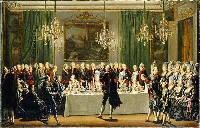 Publik taffel på Stockholms slott Nyårsdagen 1779. I bakgrunden syns tavlan Bassano Cleopatra och Antonius avbildad.